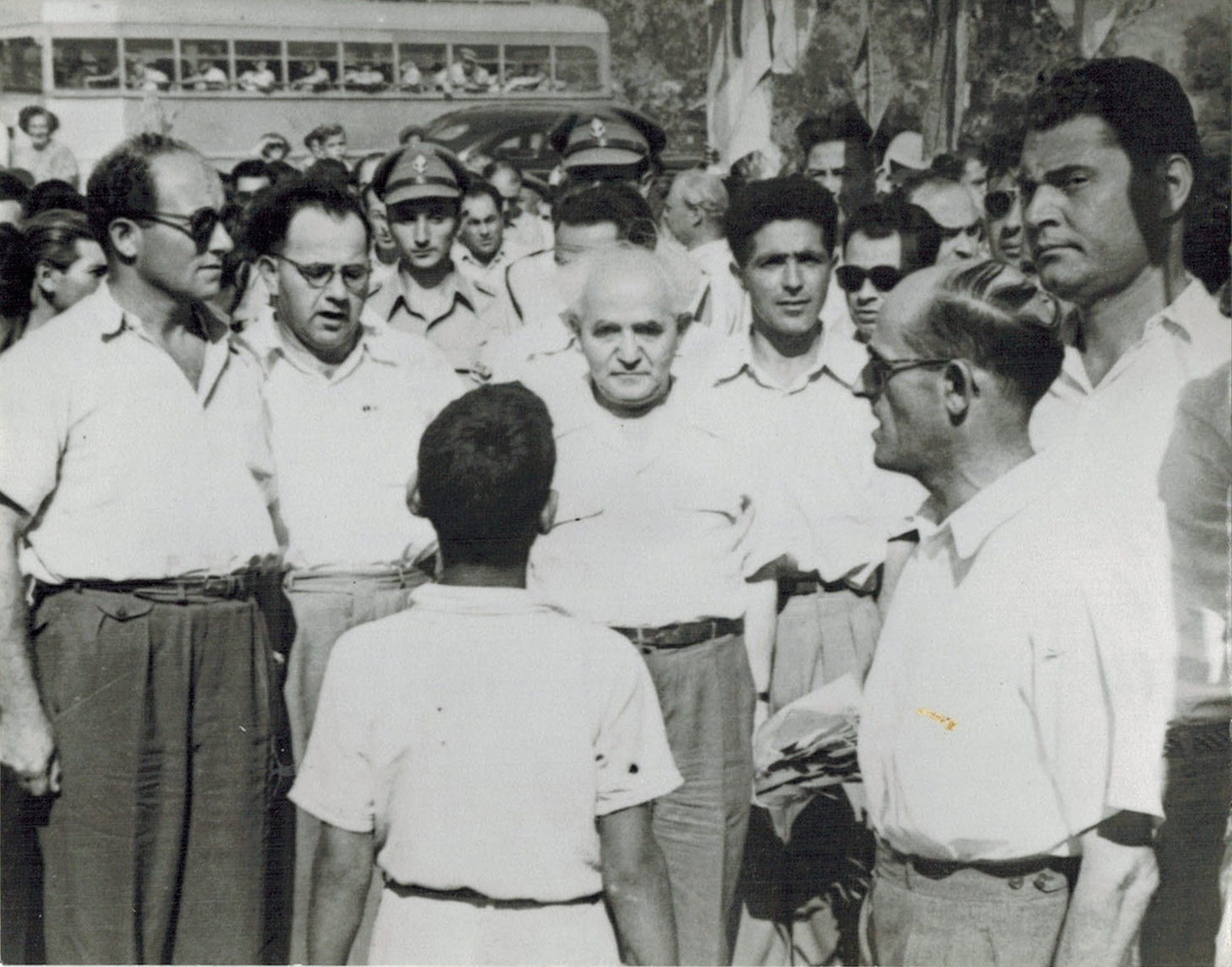 ביקור דוד בן גוריון במחנה העולים